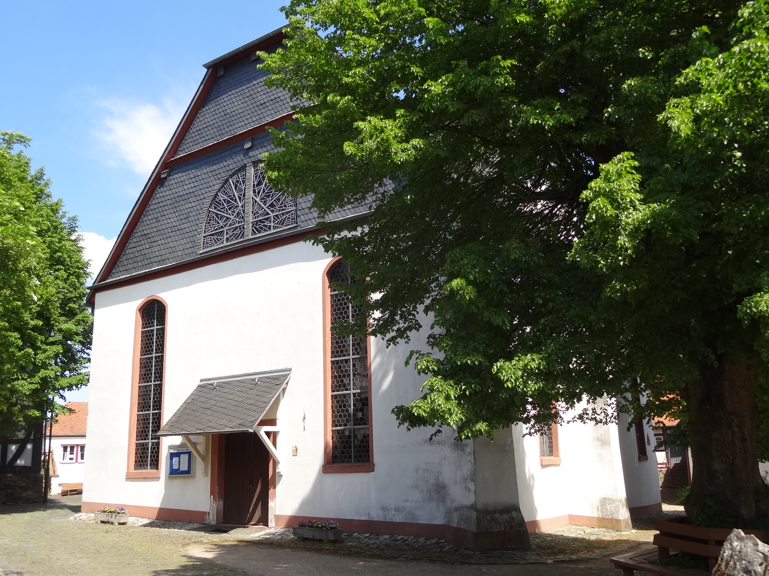 Evangelische Pfarrkirche (Hoch-Weisel)